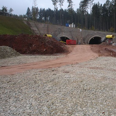 Höllbergtunnel near Bernterode